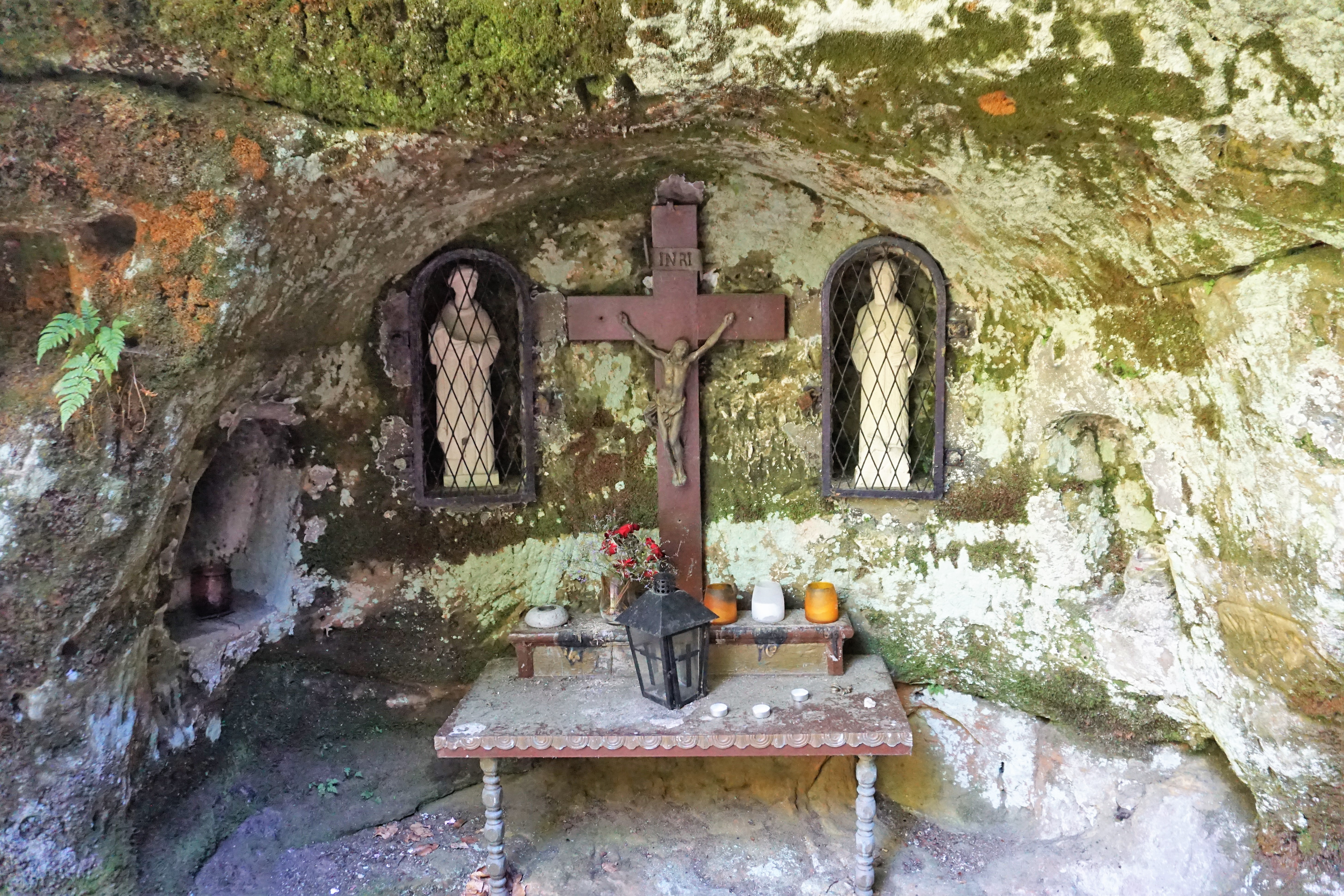 Grunewald, commune de Steinsel. Intérieur de la grotte de Schetzel. À droite Schetzel, à gauche Achard de saint-Victor.